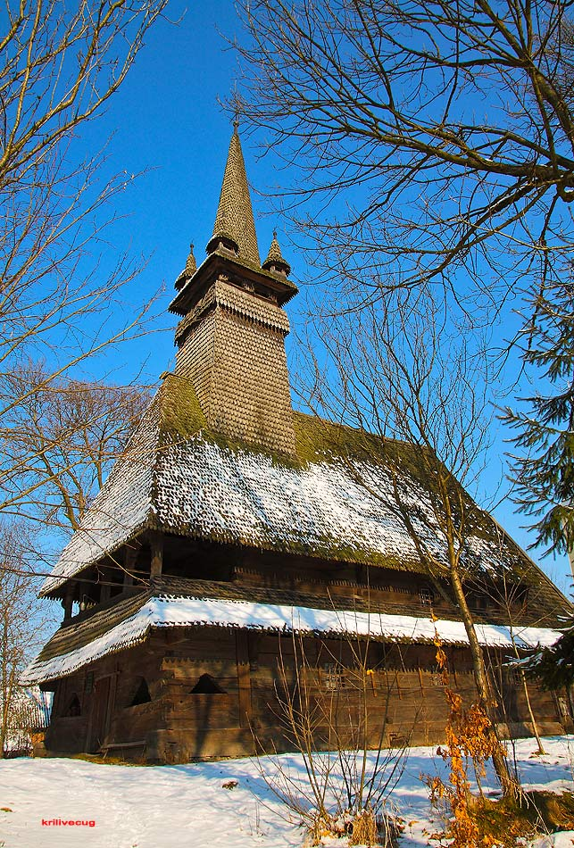 Дерев'яна церква в селі Сокирниця. Храм Святого Миколи Чудотворця XVII століття.